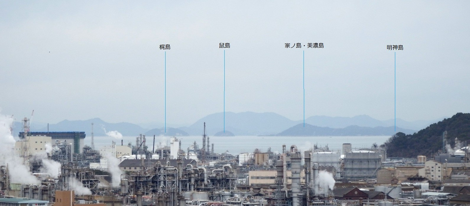 四阪島を日暮別邸記念館より臨む